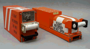 קופסאות שחורות